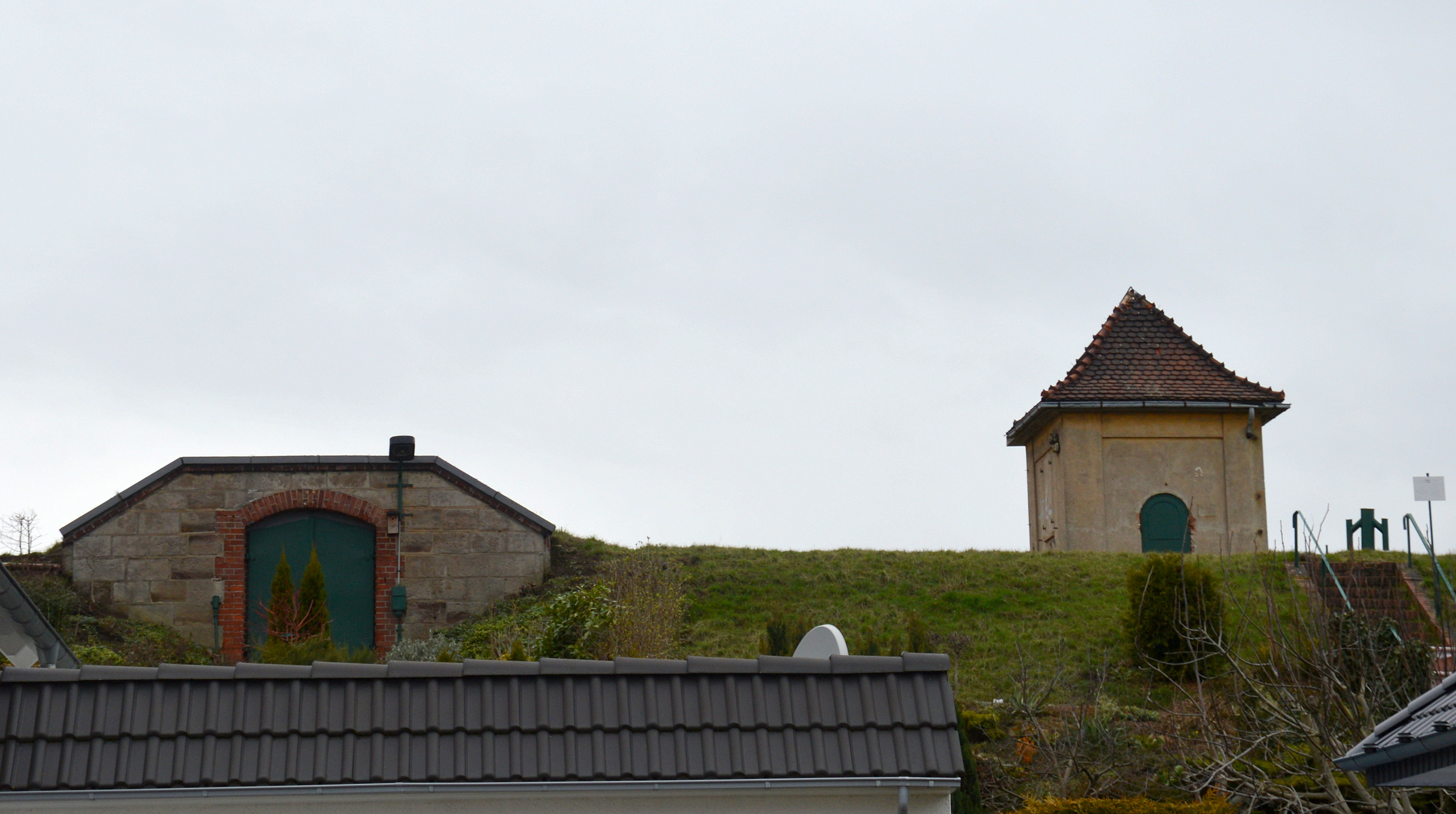 Hochbehälter Assmannstraße